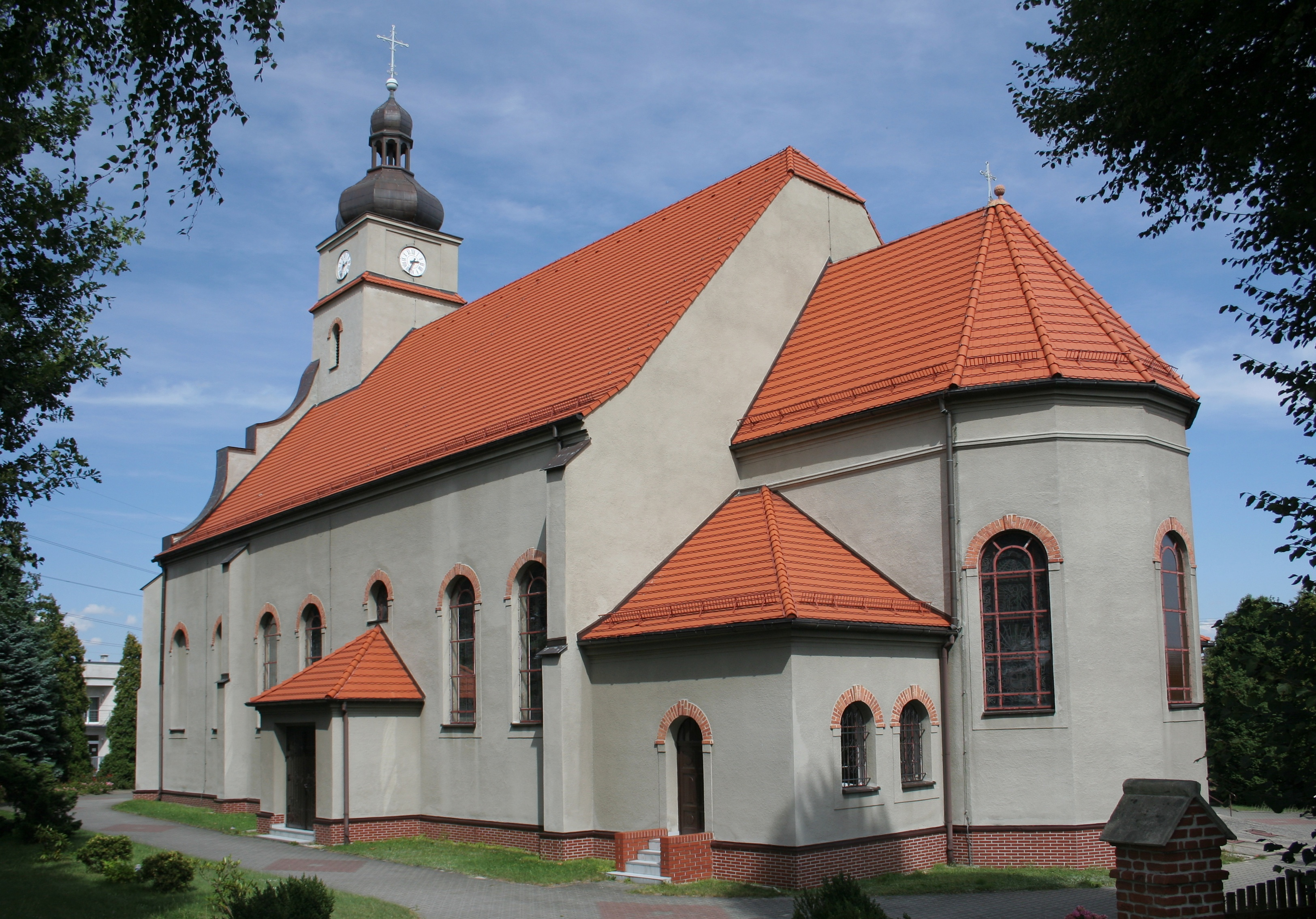 Kościół pod wezwaniem Chrystusa Króla w Golejowie, dzielnicy Rybnika.